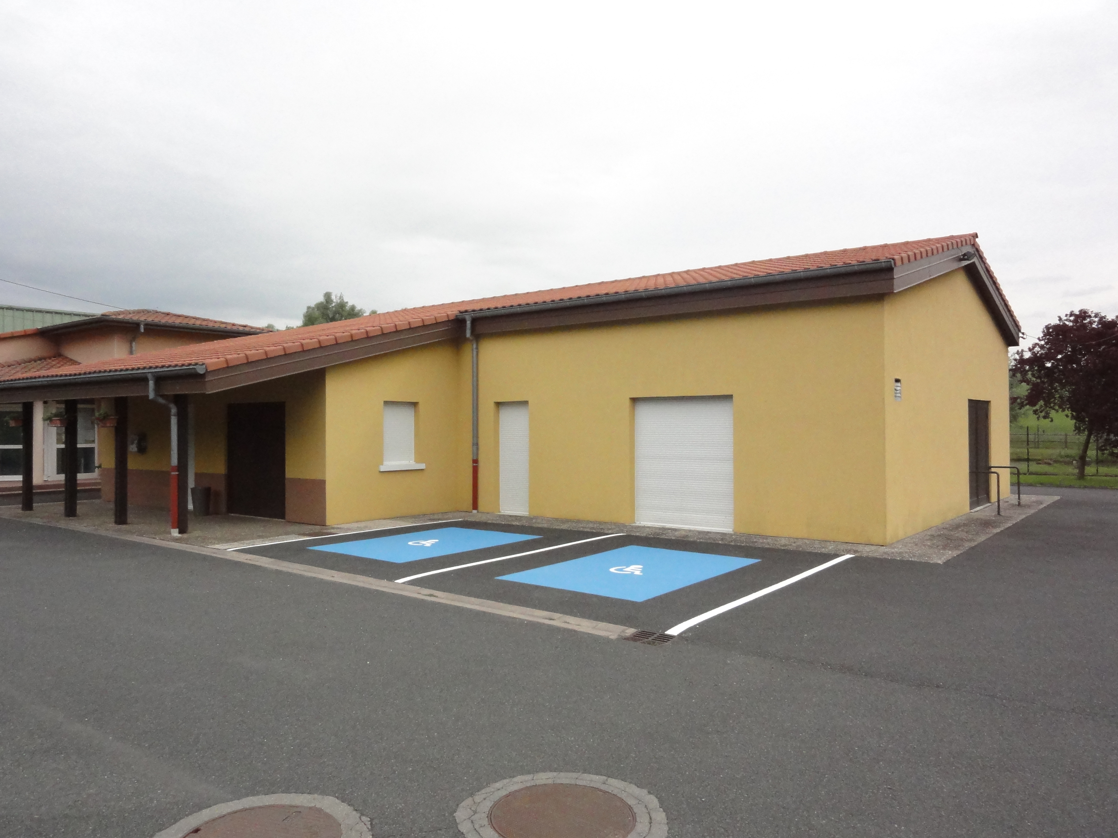 Bébing (Moselle) salle communale